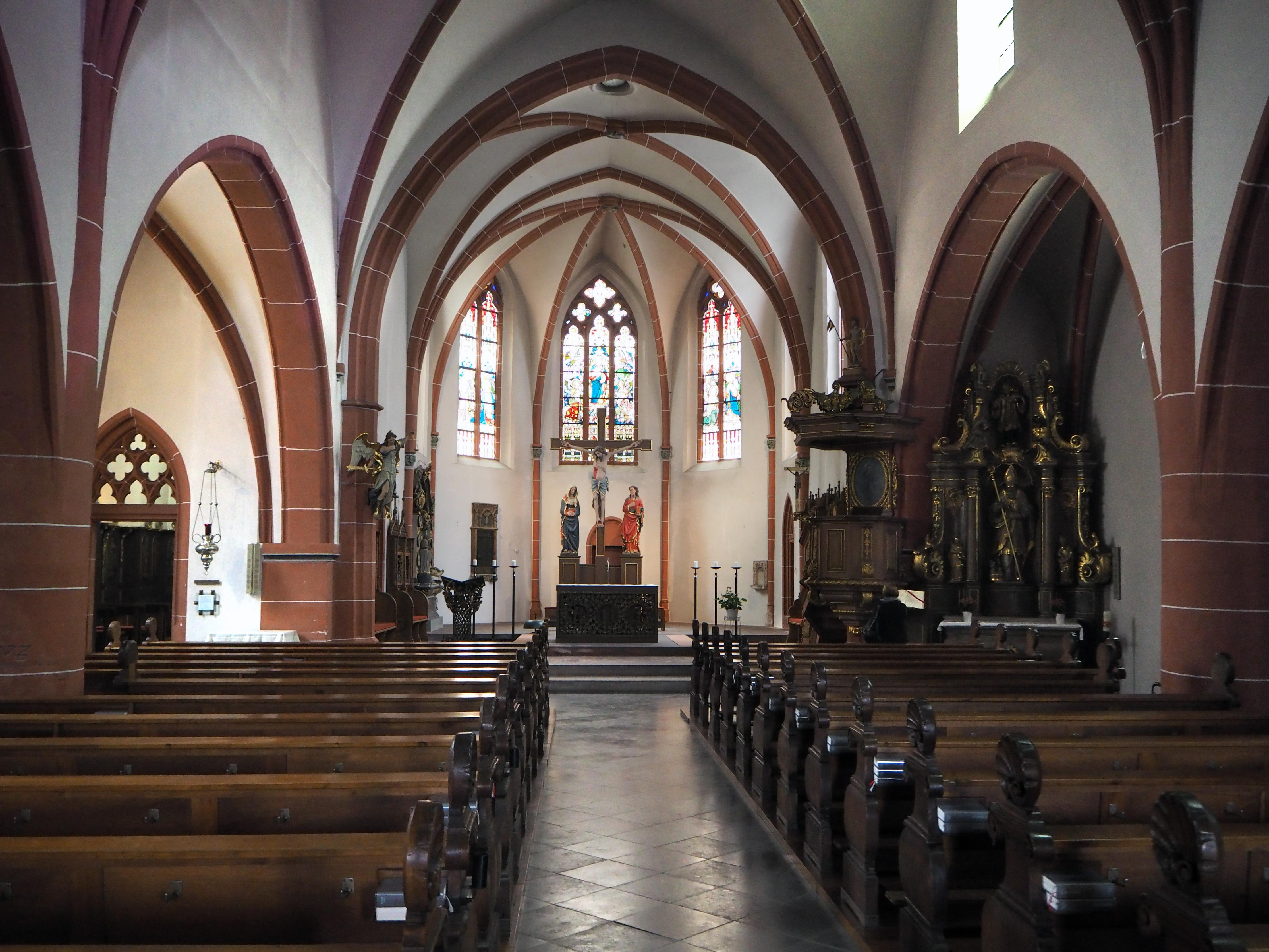 Berkastel-Kues, St. Michael und St. Sebastian, innen nach Osten